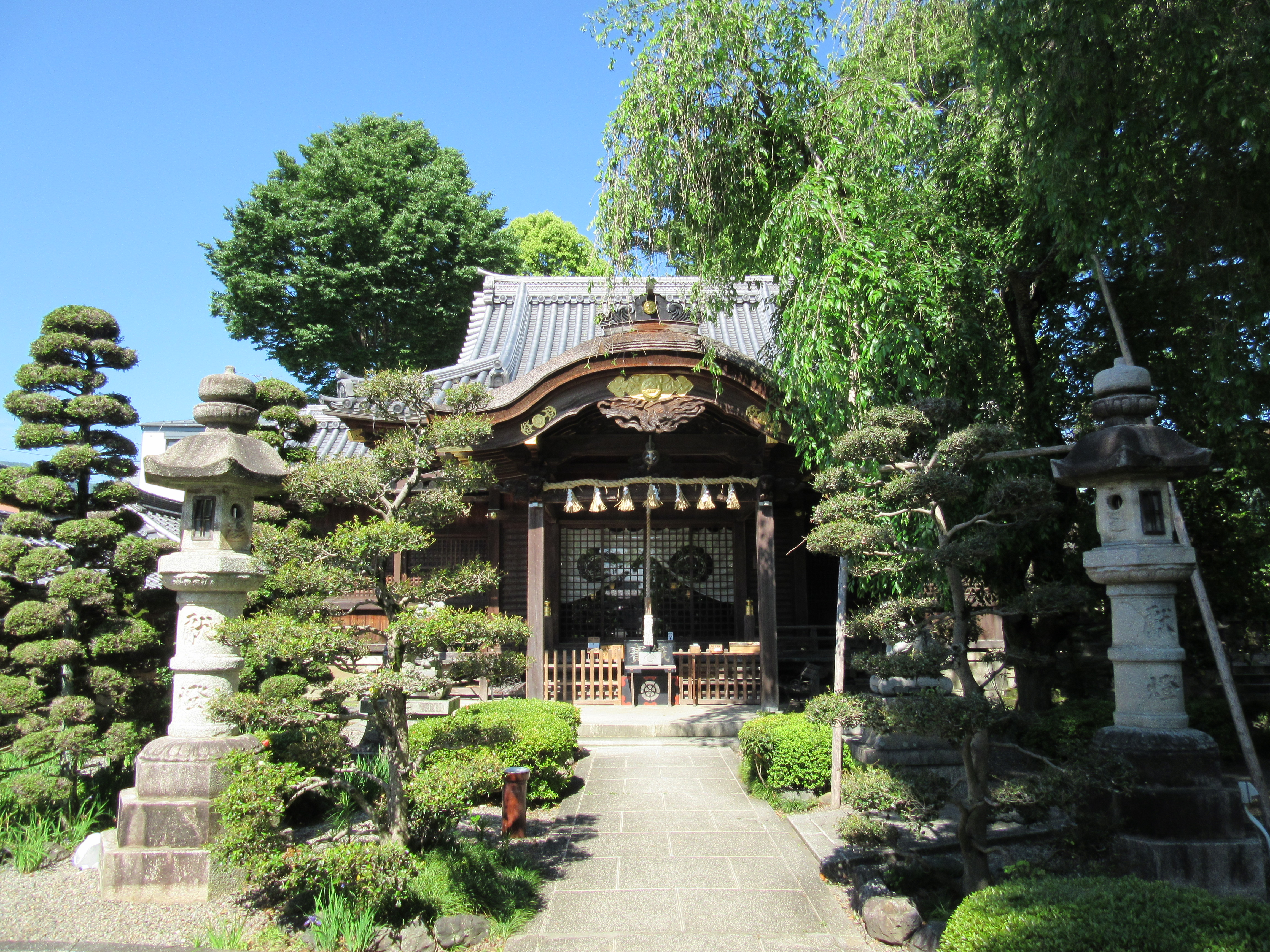 八重垣神社